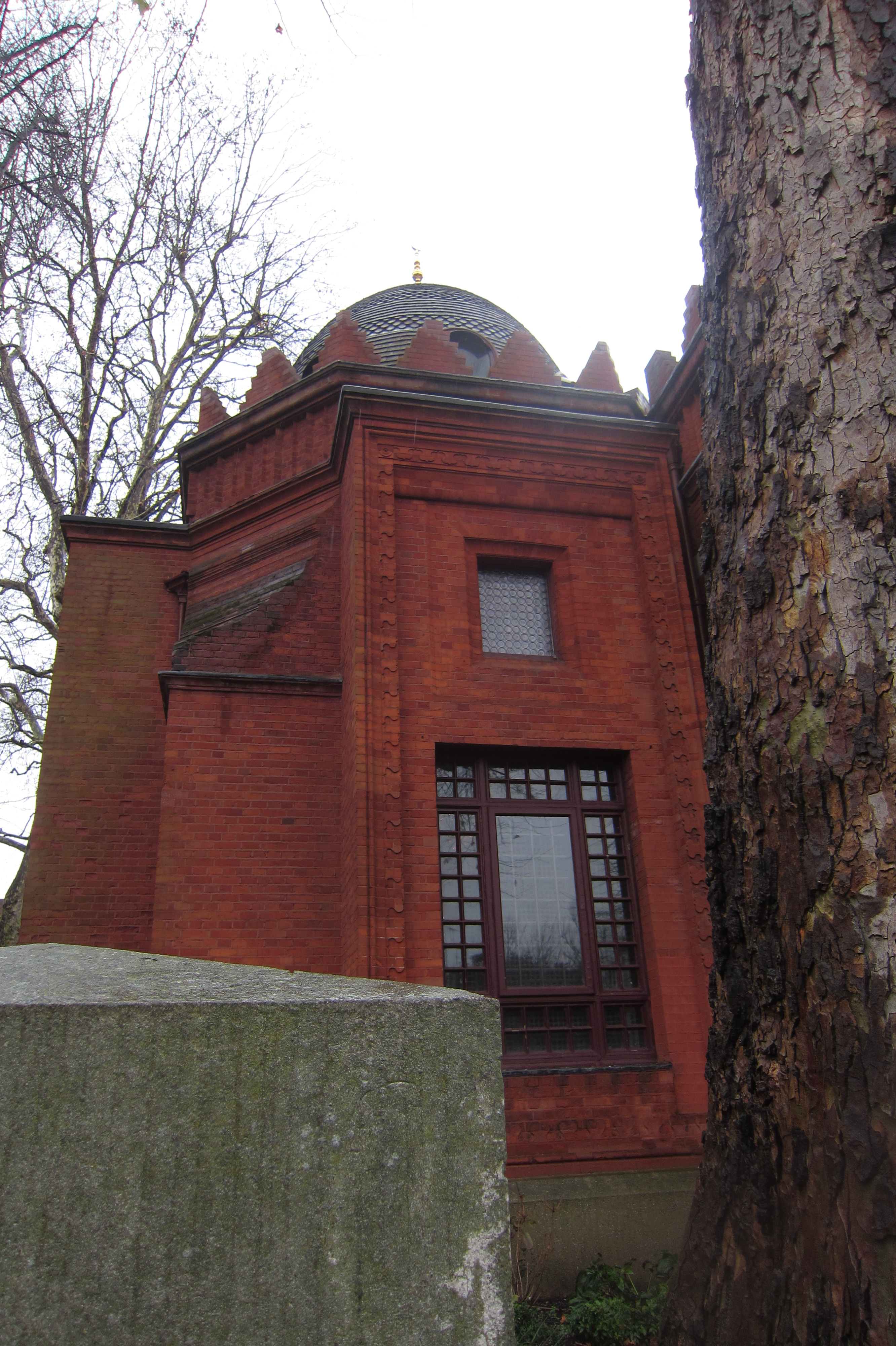 Leighton House, detail gevel, Kensington, London